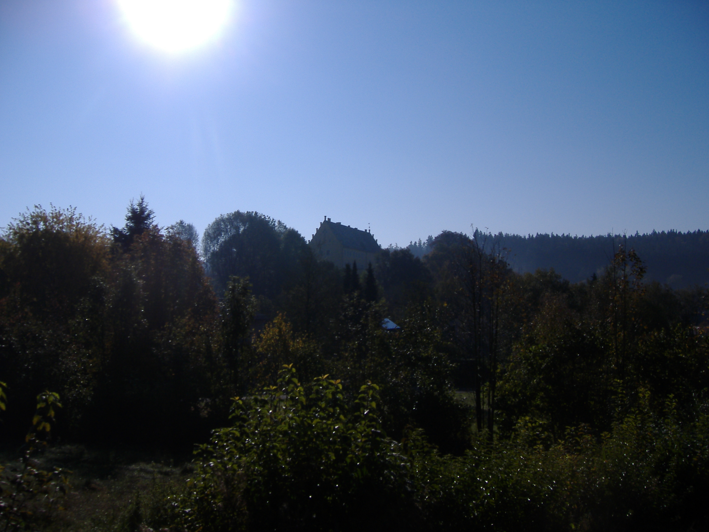 Aystetten